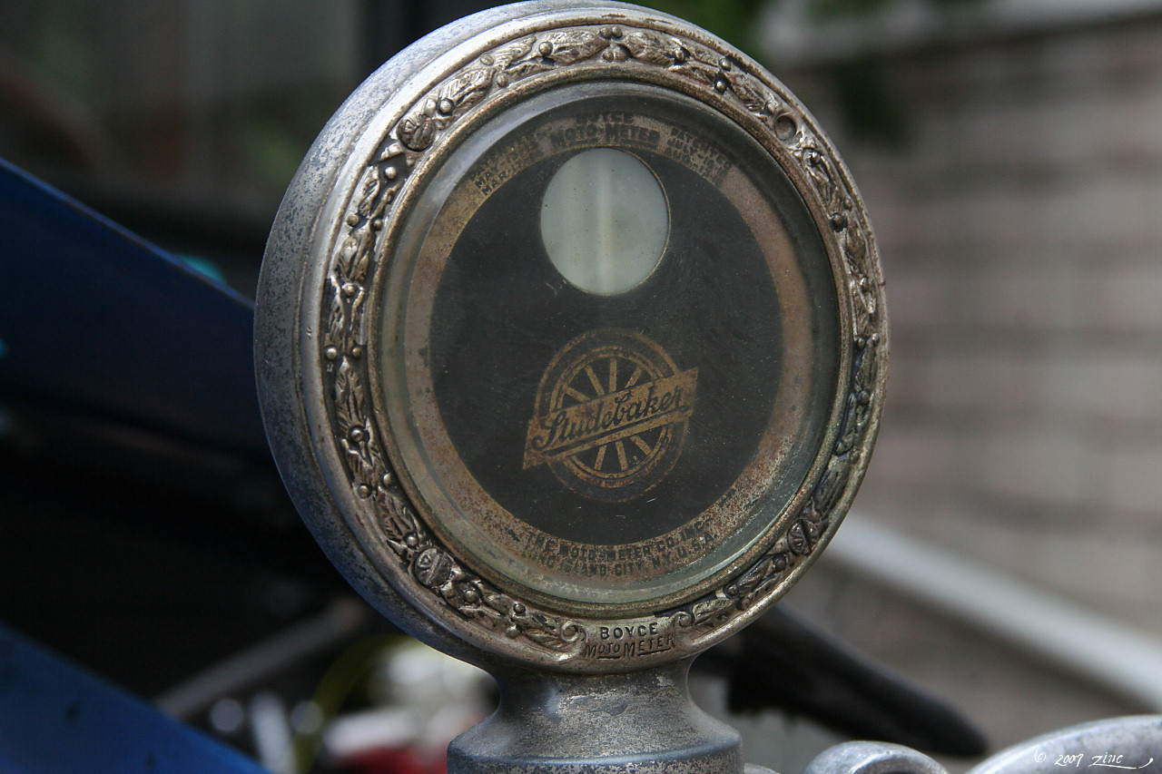 Radiator temperature gauge 1926 Studebaker Big Six Sedan